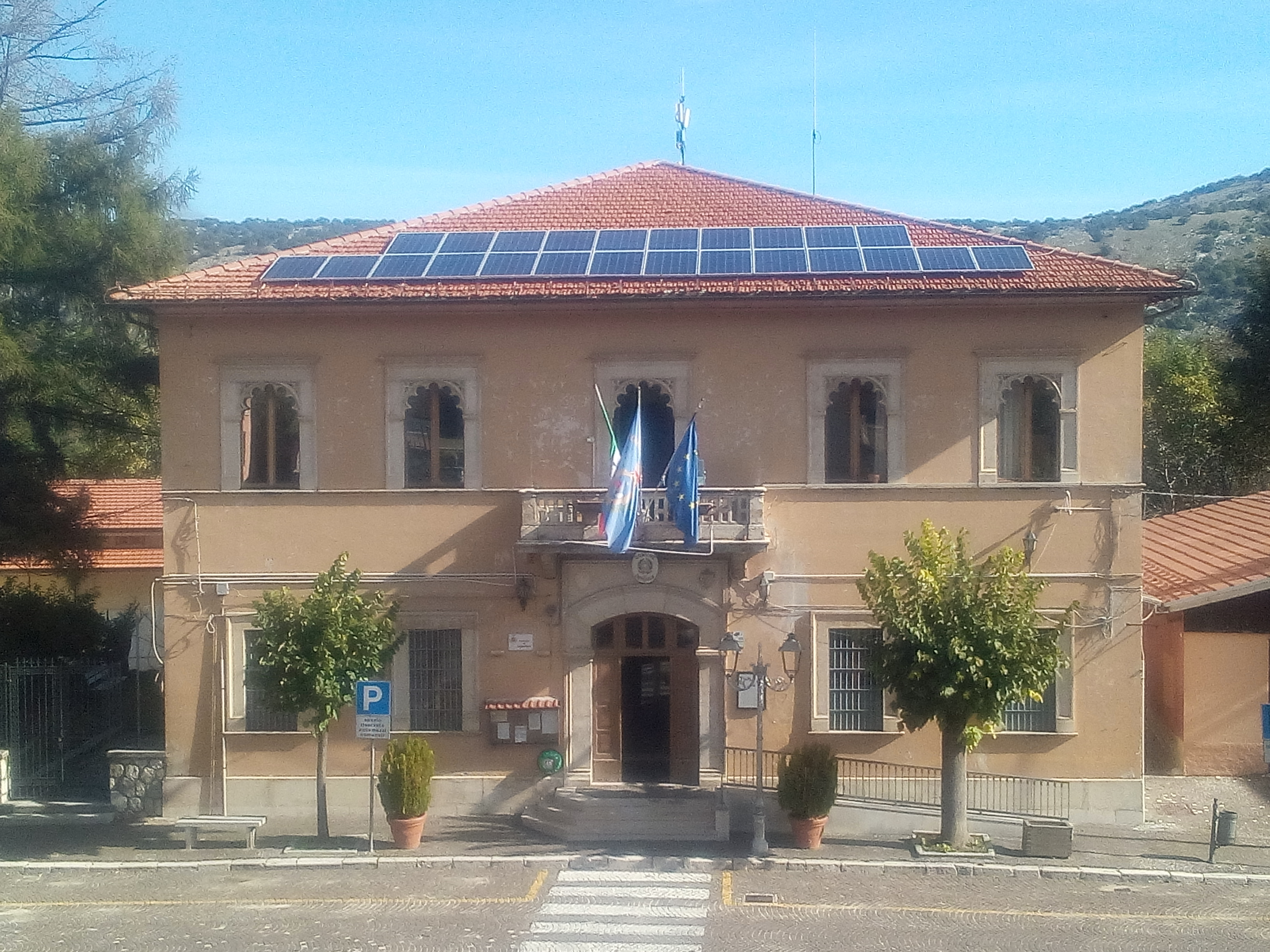 Palazzo municipale di Cappadocia in Abruzzo